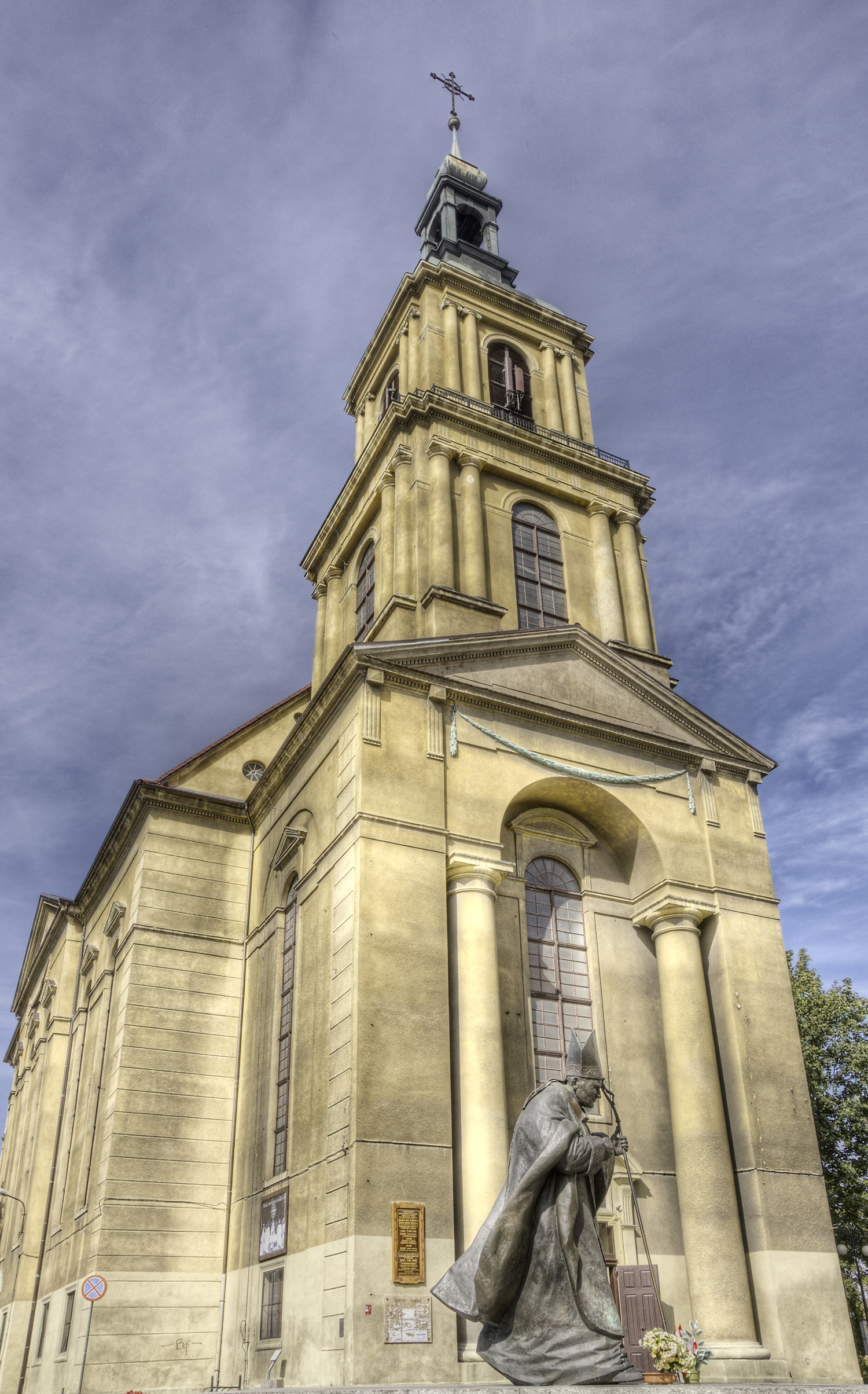 kościół ewangelicki, ob. paraf. pw. NMP Matki Kościoła Dzierżoniów, Świdnicka, Dzierżoniów